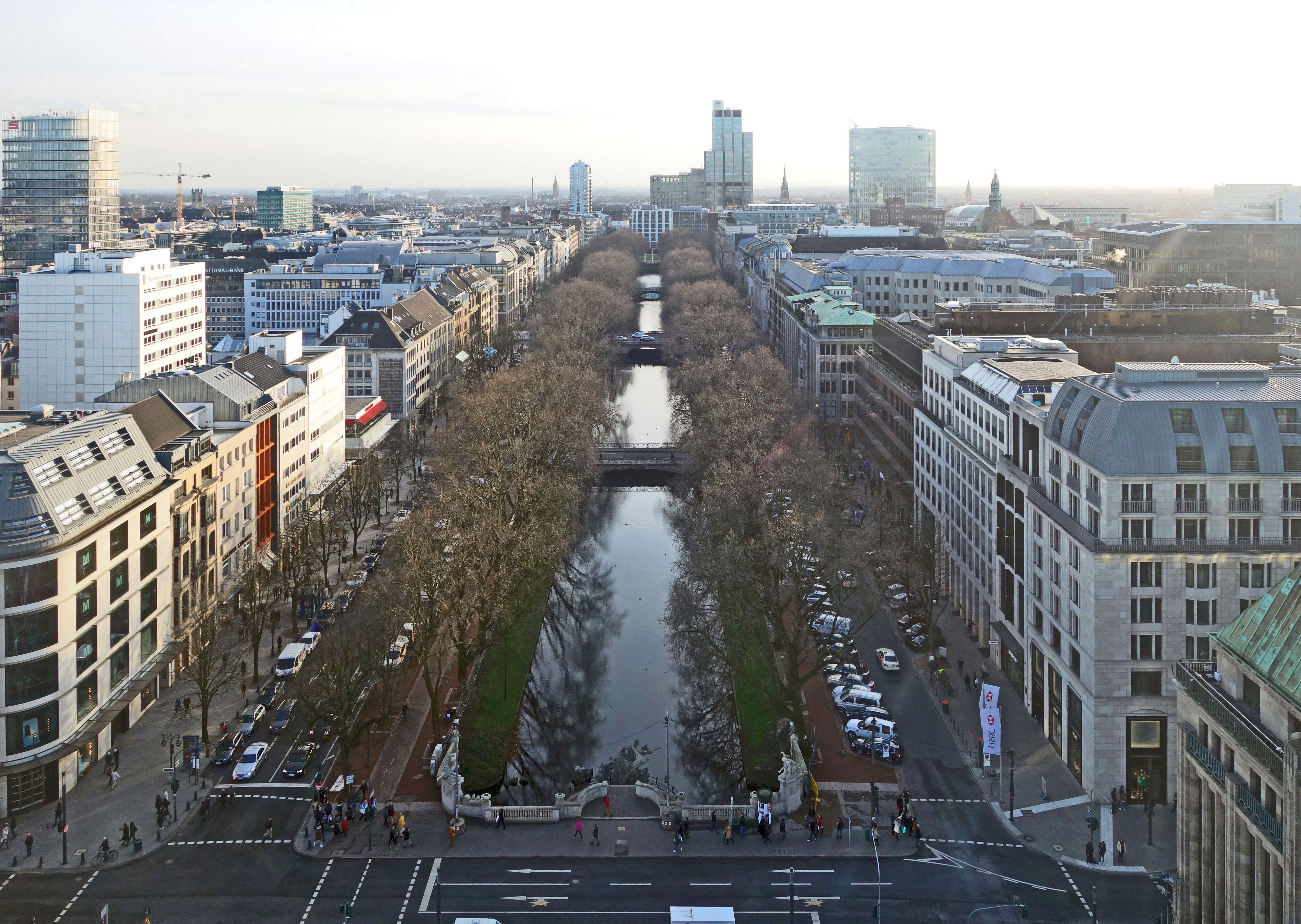 Düsseldorf, Königsallee. Vom erstmals hier aufgestellten Riesenrad aus aufgenommen am ersten offiziellen Eröffnungstag, 28. Januar 2016.